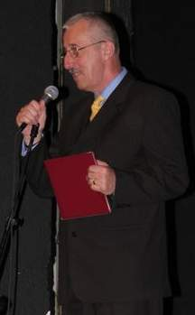 Karol Semik - dyrektor VI LO w Radomiu (1991-2007), a następnie Mazowiecki Kurator Oświaty (od 2008)